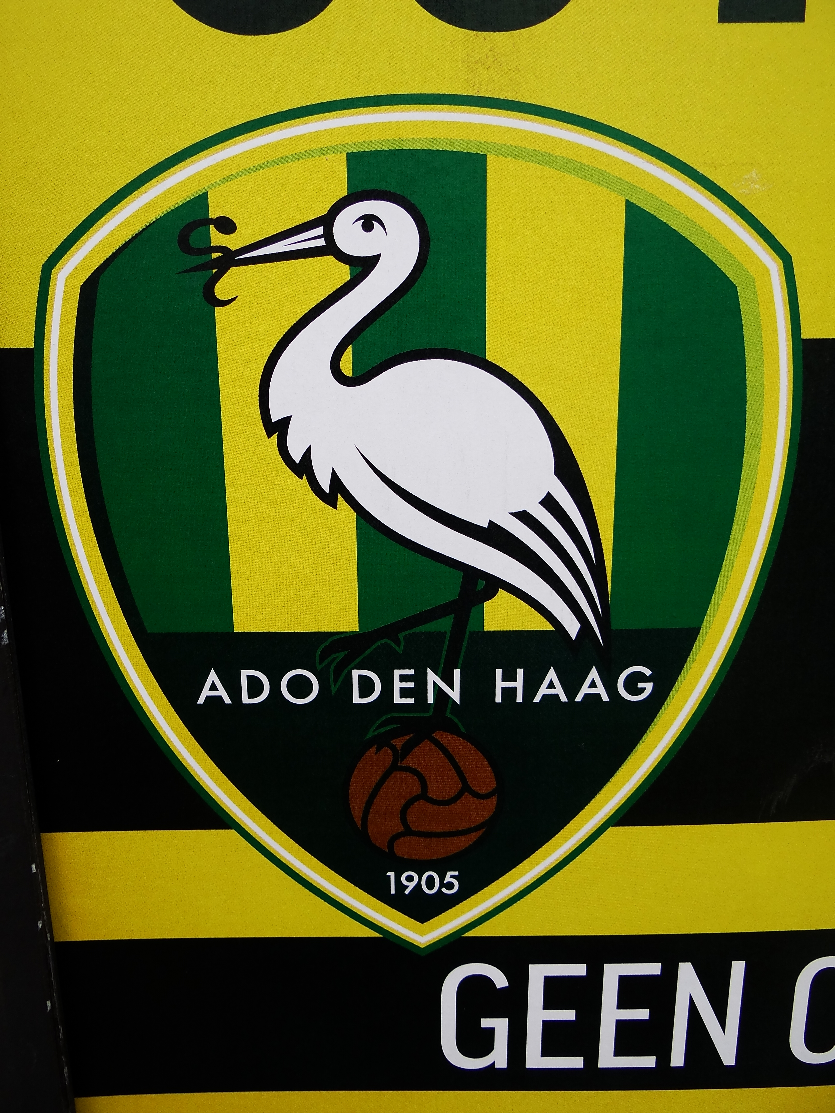 Logo van ADO Den Haag op een poster